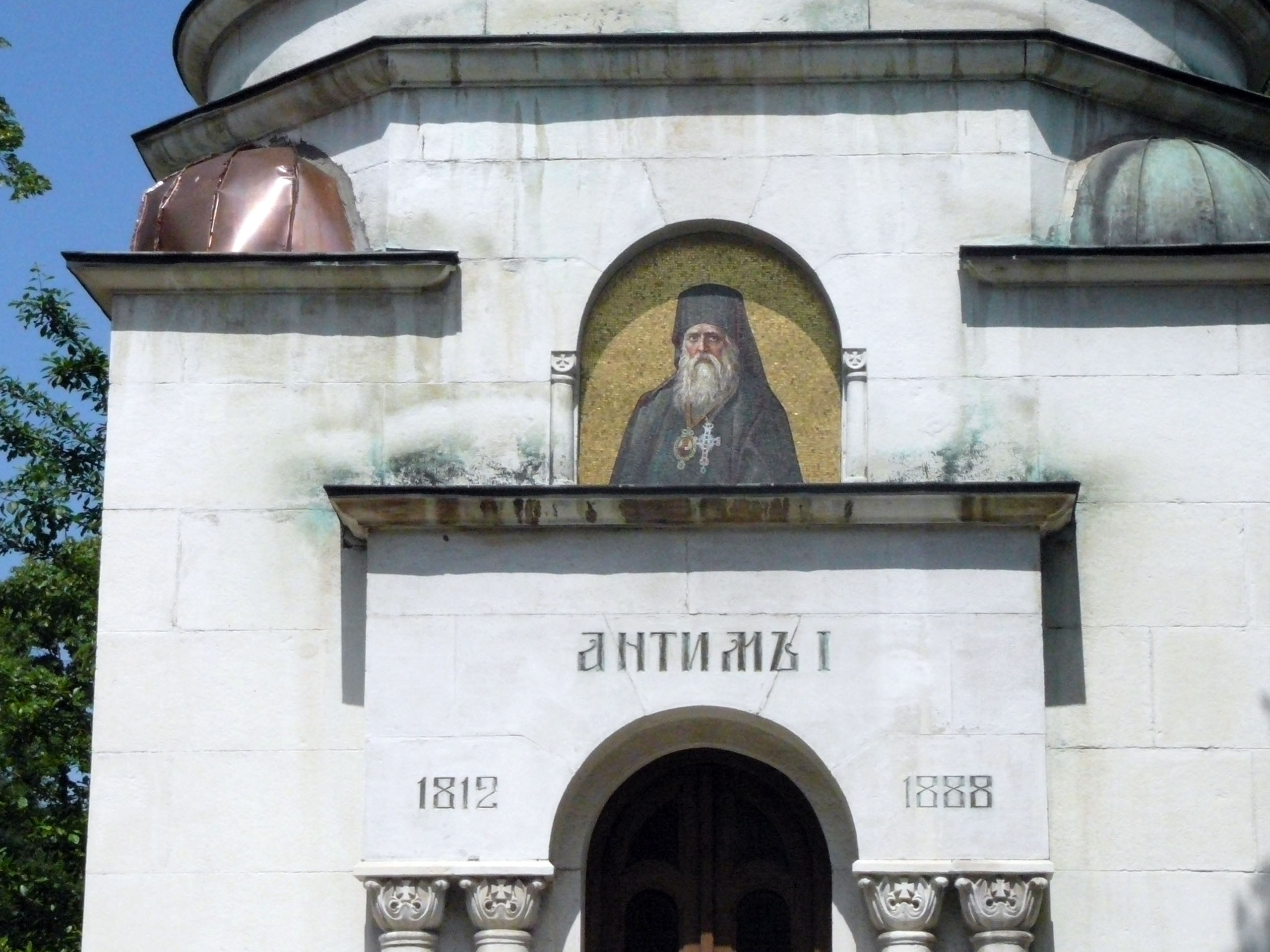 Vidin,Bulgaria; Мавзолей на екзарх Антим I